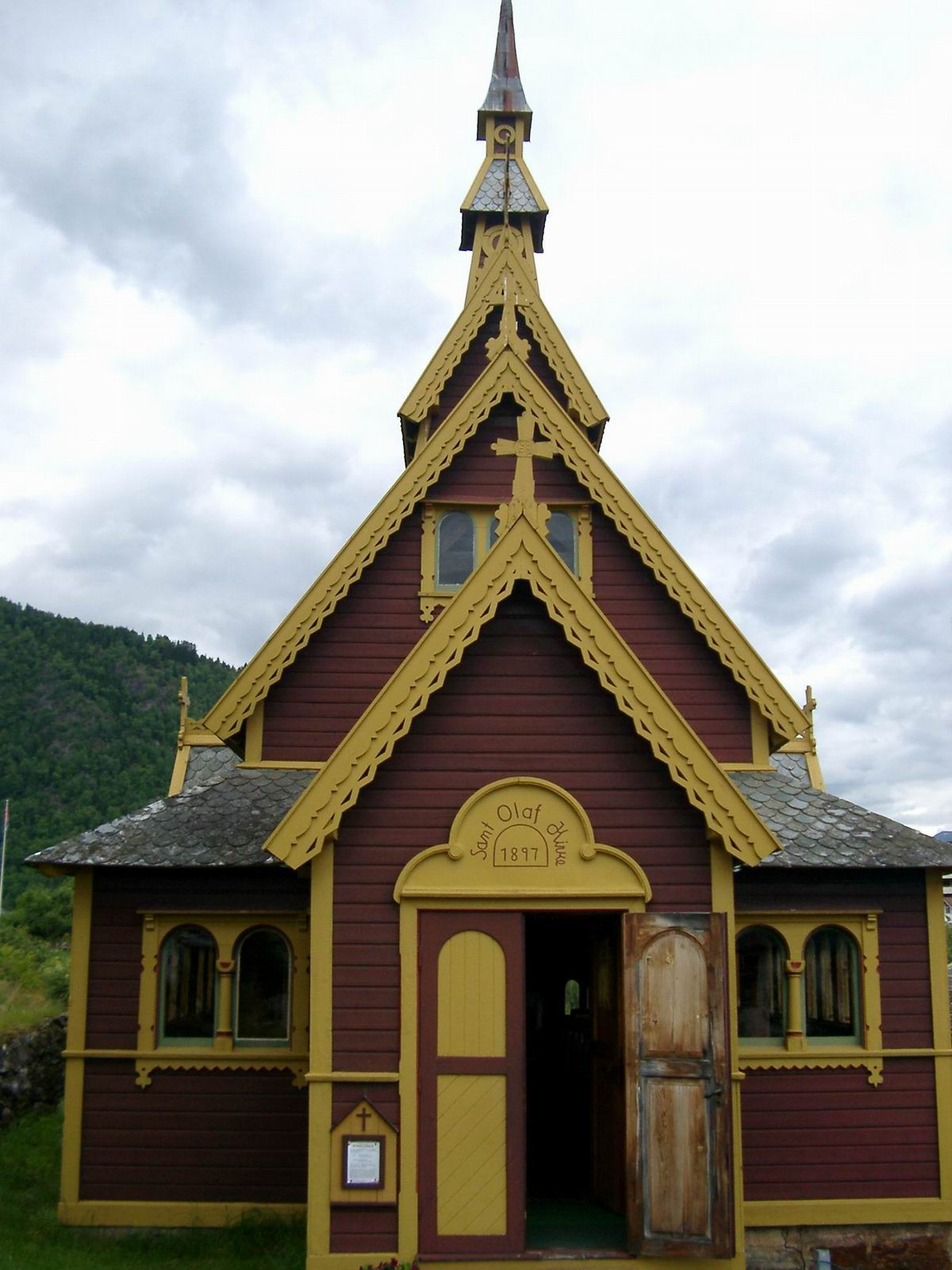 Balestrand Norwegen St. Olaf´s Church